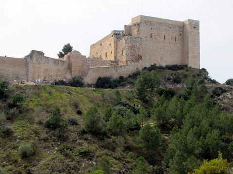 Castell de Miravet a la comarca de la Ribera d'Ebre - Catalunya